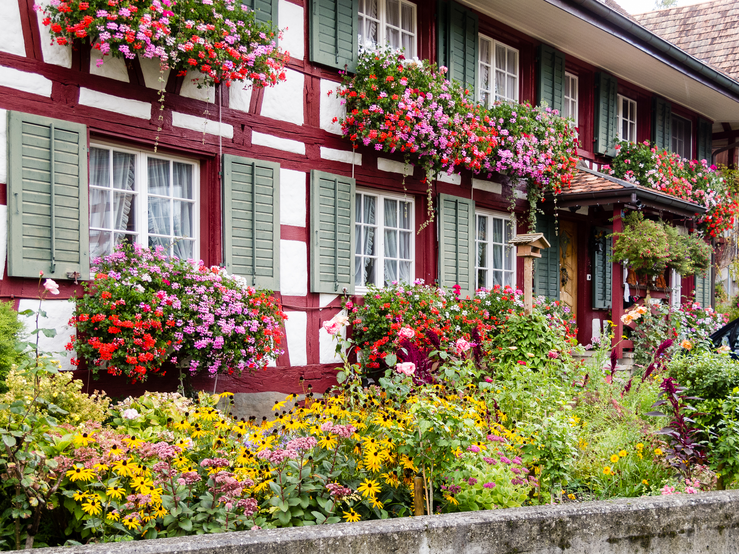 Riegelhaus in Ottoberg TG (Dorf 4)